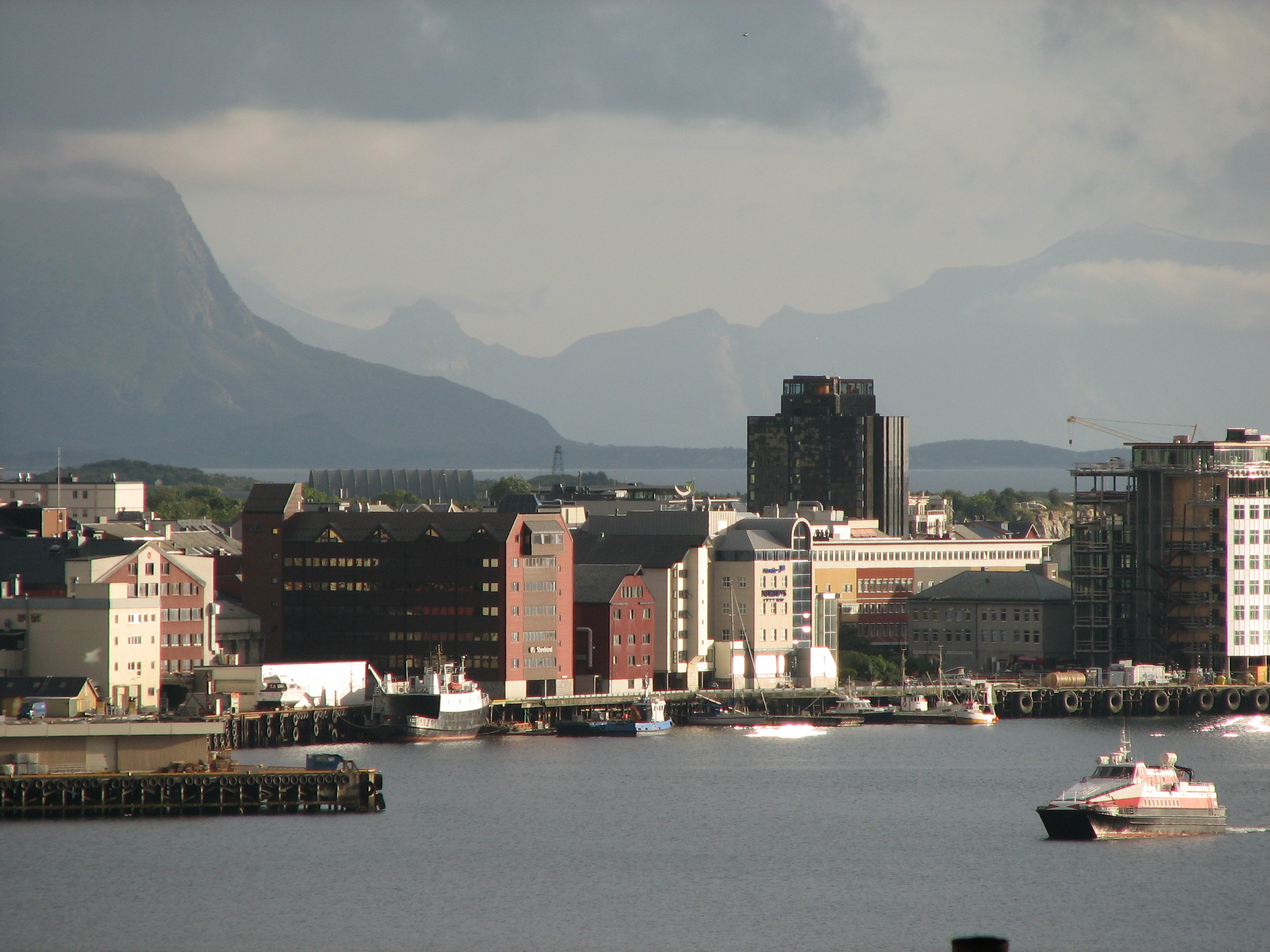 Bodø Harbour